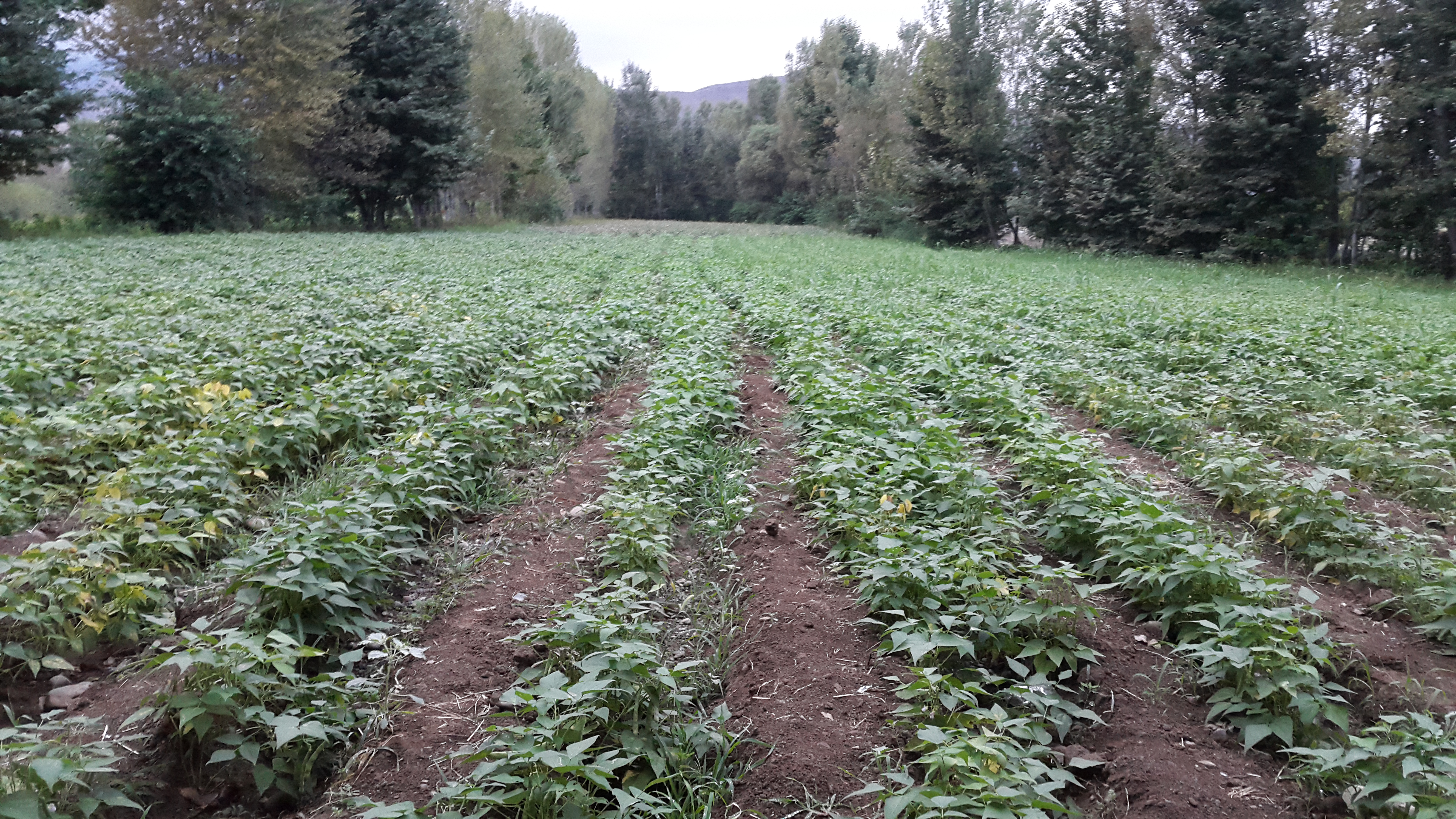 center